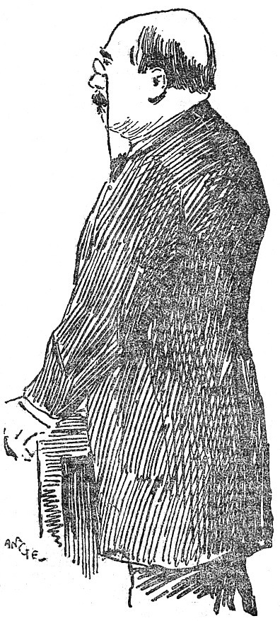 "M. Dingler".